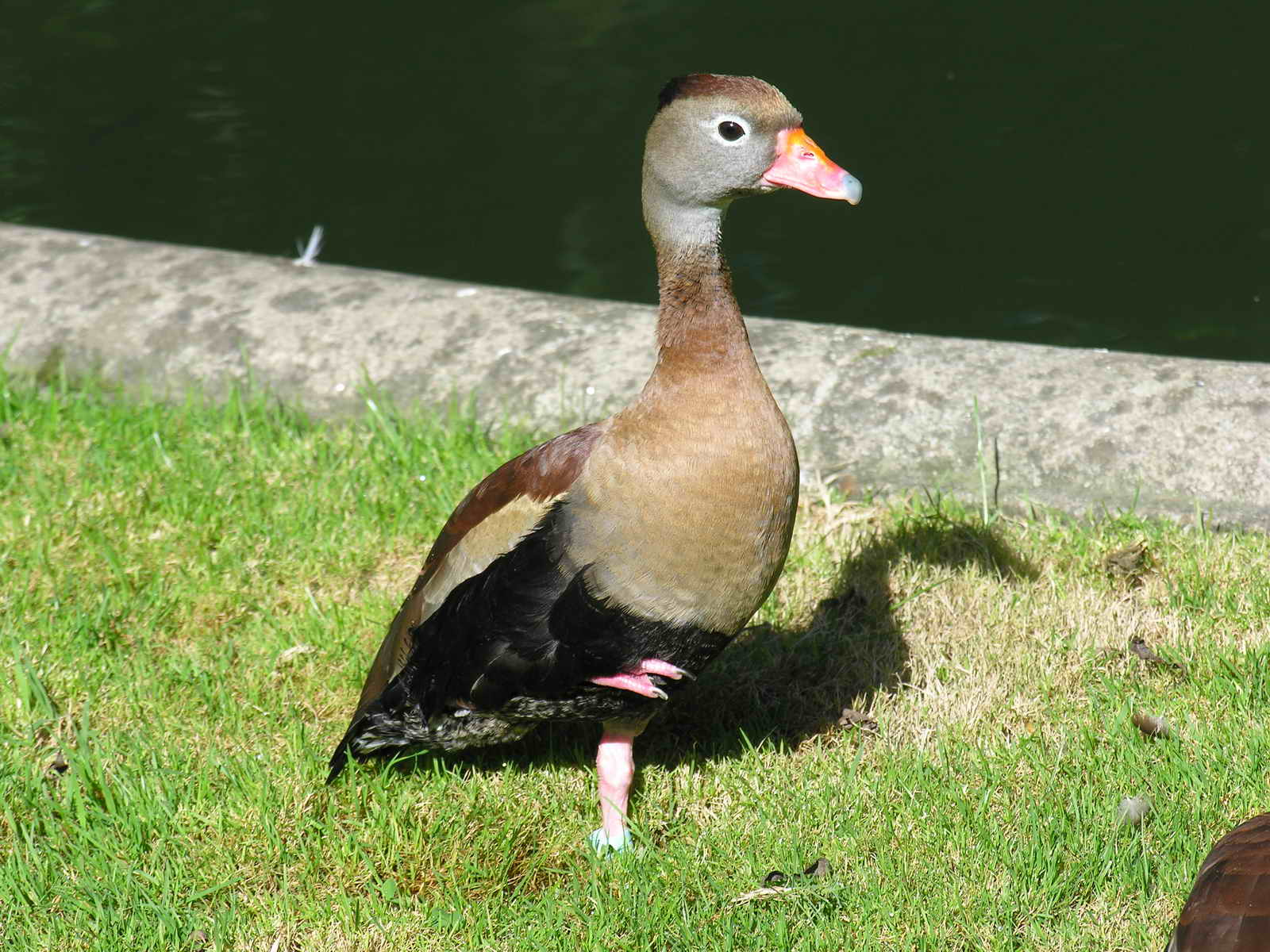 duck, parrulo, pato